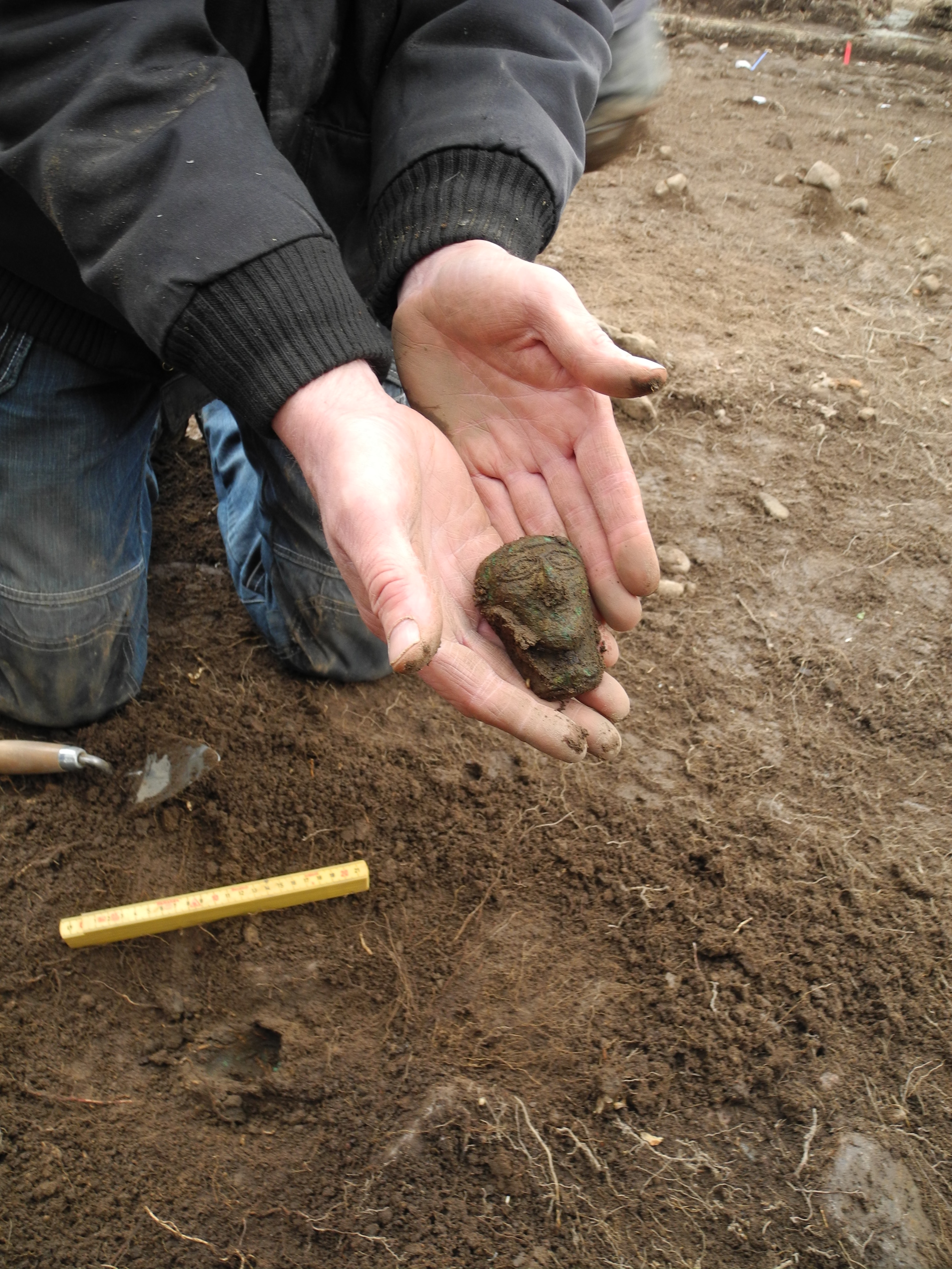 Maskbild av brons (Blm 28583:62), fotograferad direkt efter upptagandet vid utgrävning i april 2013.